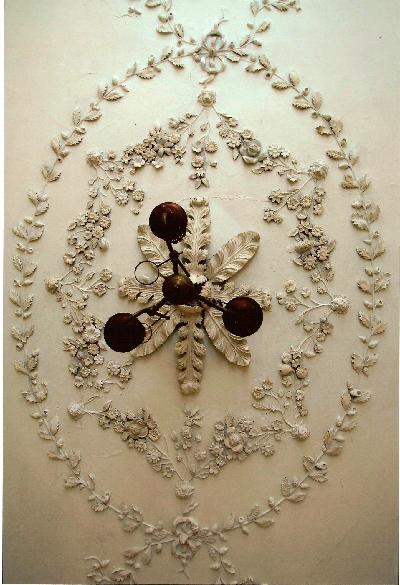 Kilbrogan_ceiling